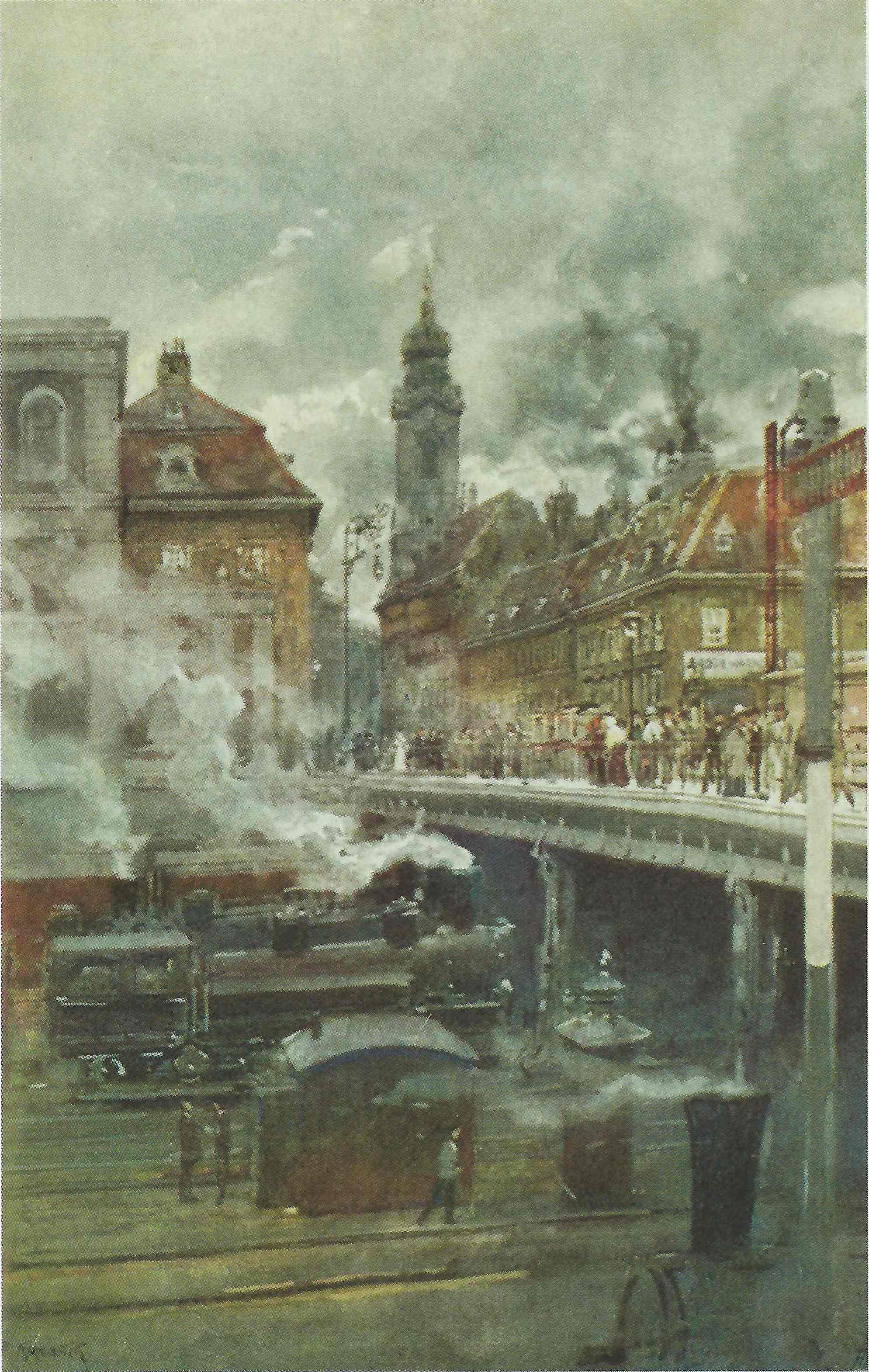 Szenerie bei der Landstraßer Brücke, Wien